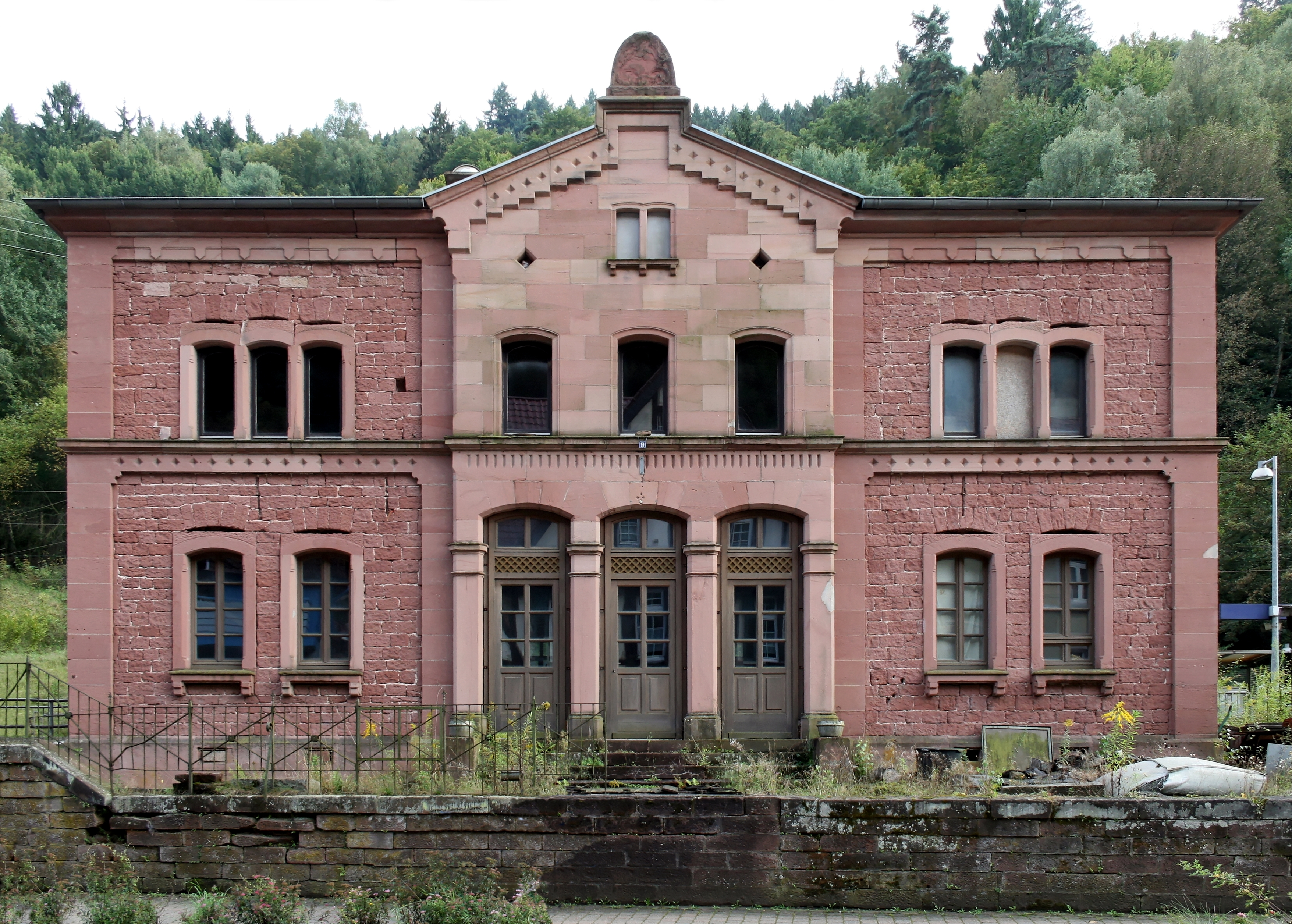 ehemaliger Bahnhof Frankenstein, leerstehend